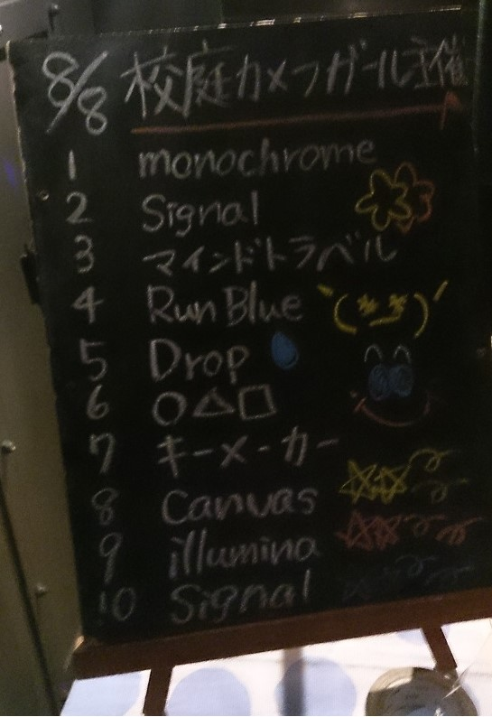 amiinaセトリボード(20150808(1))